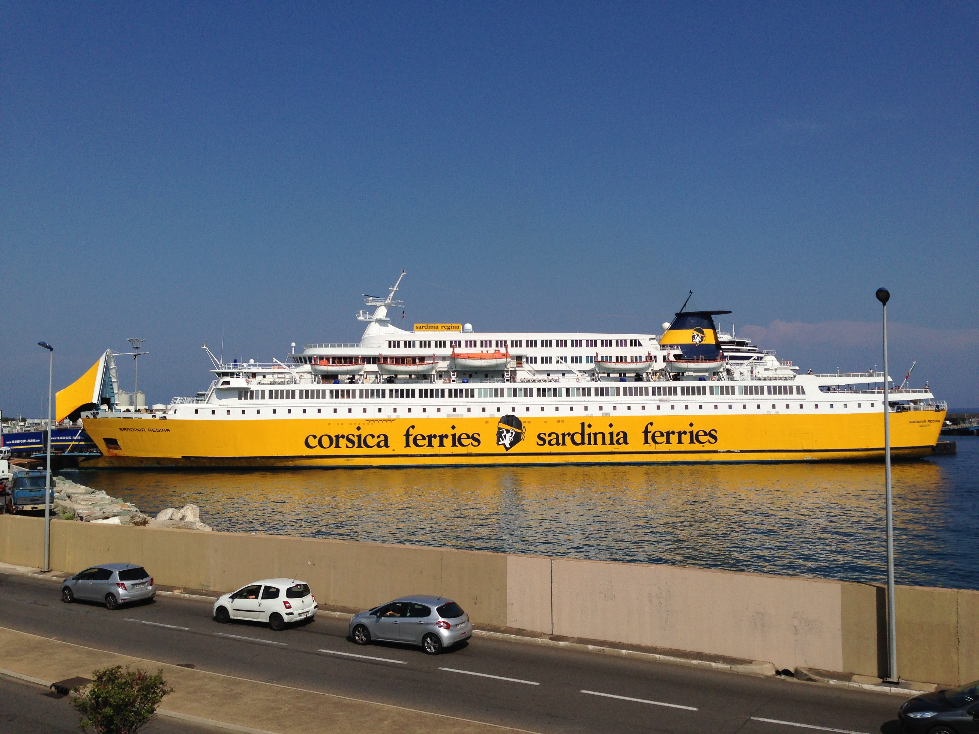 巴斯蒂亚的一艘轮船